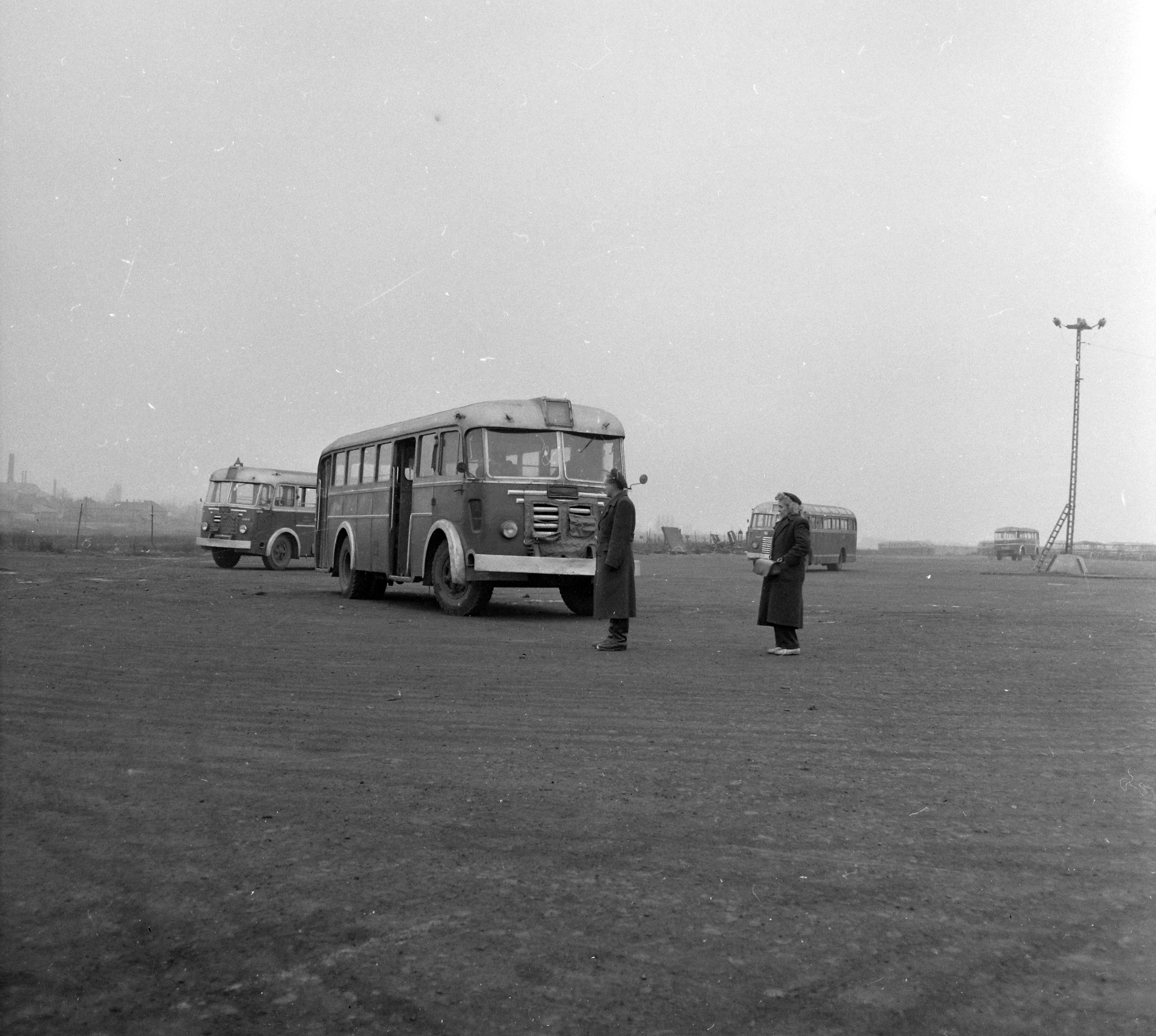 Nagykőrösi út 152. (ekkor Gyáli út 76.), a Kilián György autóbuszgarázs udvara. Location: Hungary, Budapest XIX. Tags: bus, Ikarus-brand, Hungarian brand, Budapest Title: Nagykőrösi út 152. (ekkor Gyáli út 76.), a Kilián György autóbuszgarázs udvara.